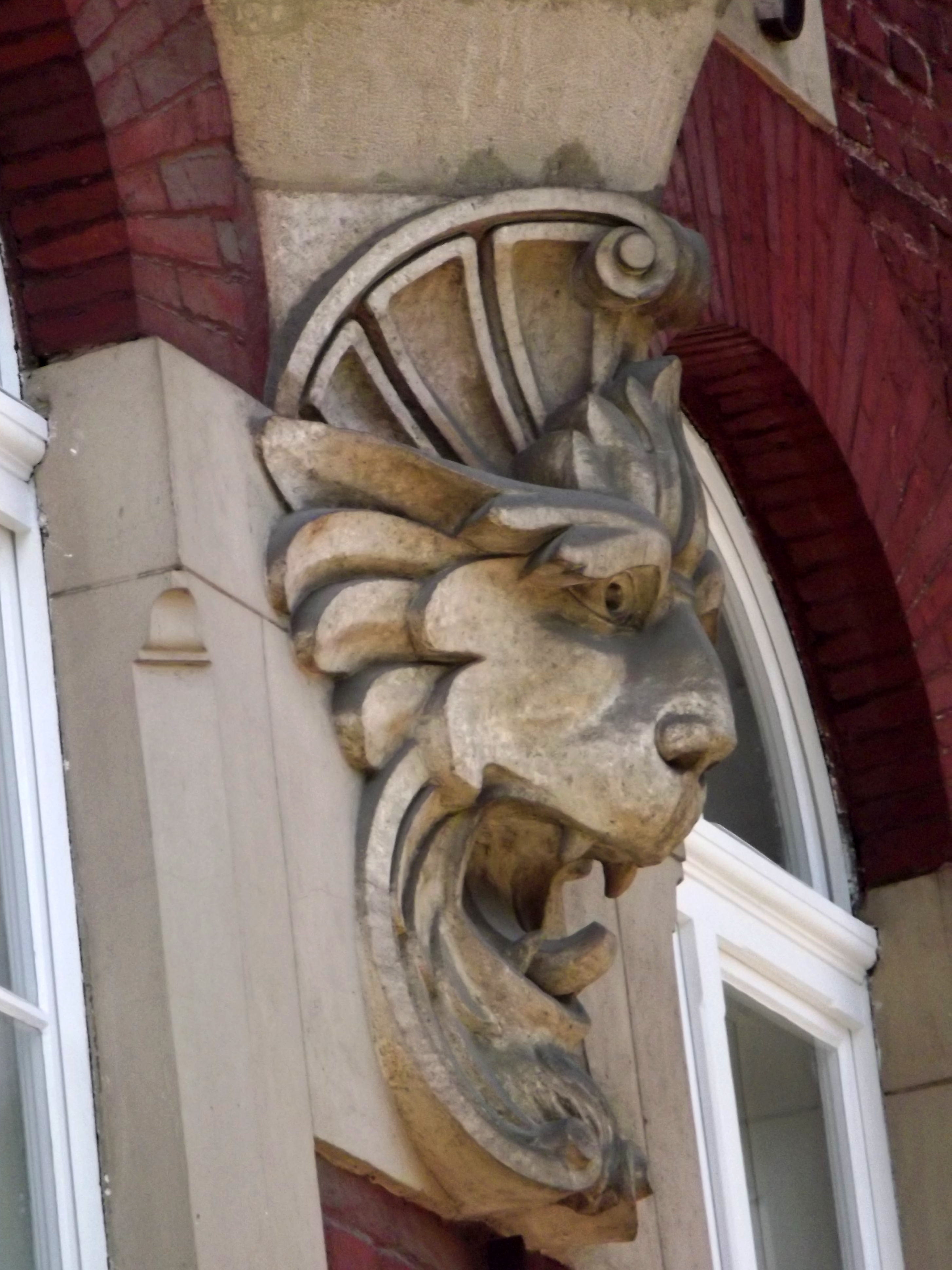 Kraków, ul. Retoryka 1, kamienica Pod Śpiewającą Żabą, 1889-1890 Wikidata has entry 617226 with data related to this item.